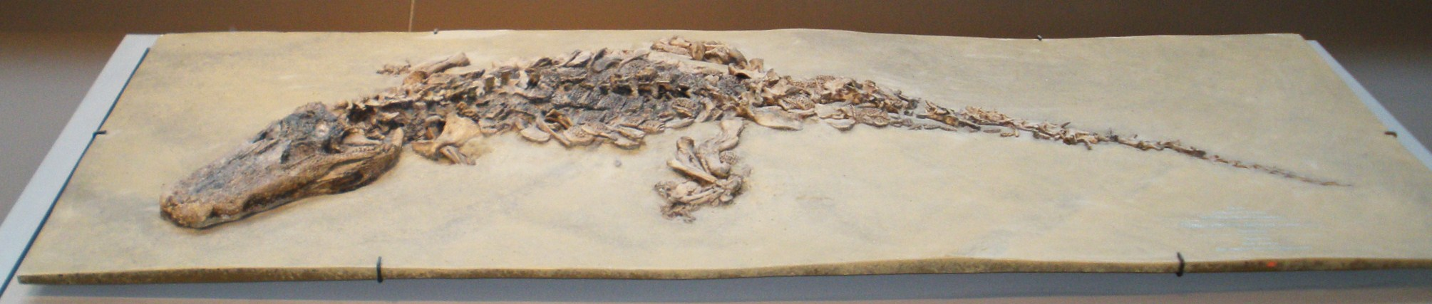 Fossil of Diplocynodon, an extinct crocodile Took the photo at Musee d'Histoire Naturelle, Brussels